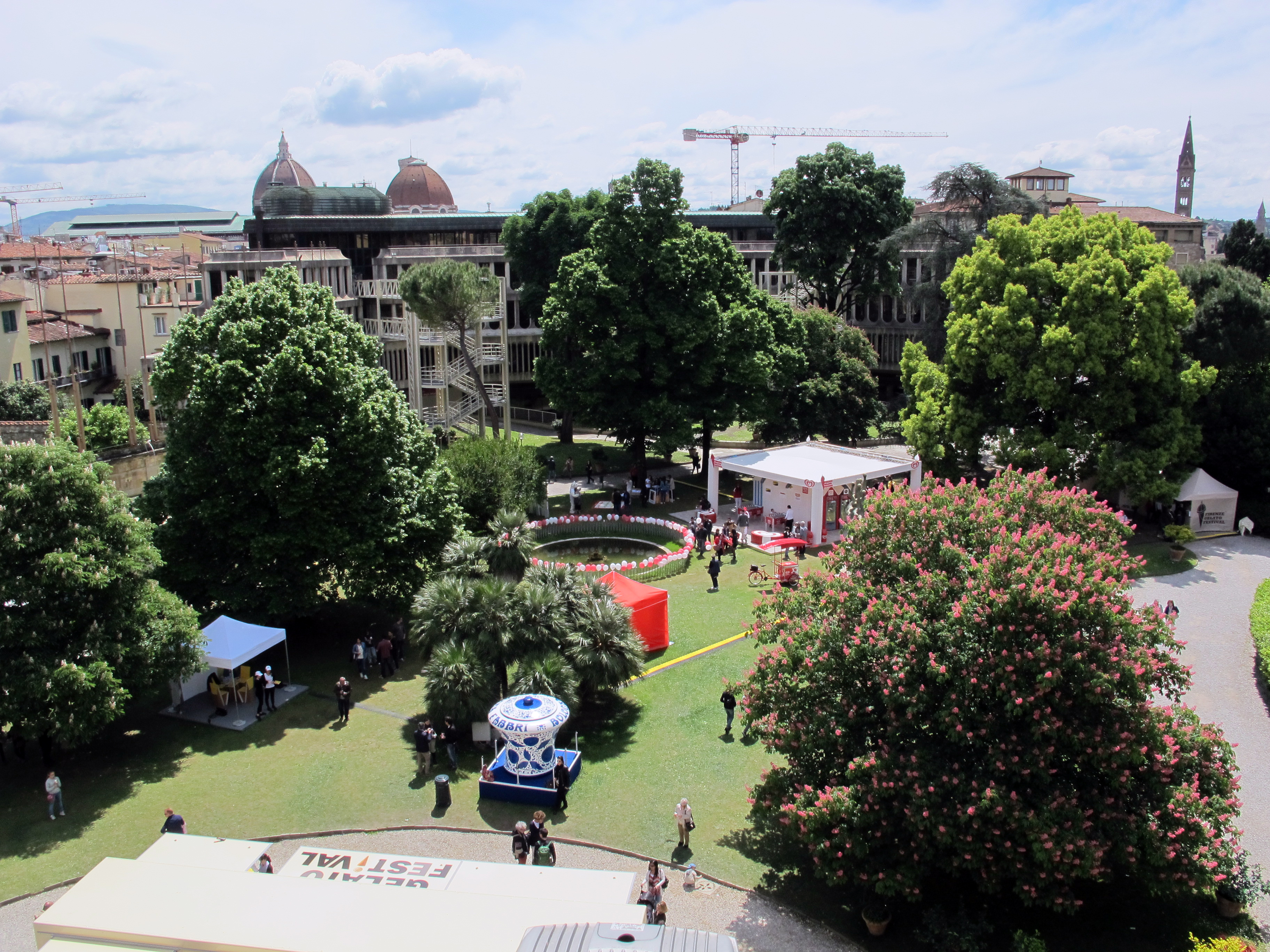 Villa Vittoria, Firenze